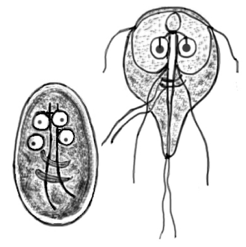 Giardia lamblia (G. intestinalis) imago and cystis